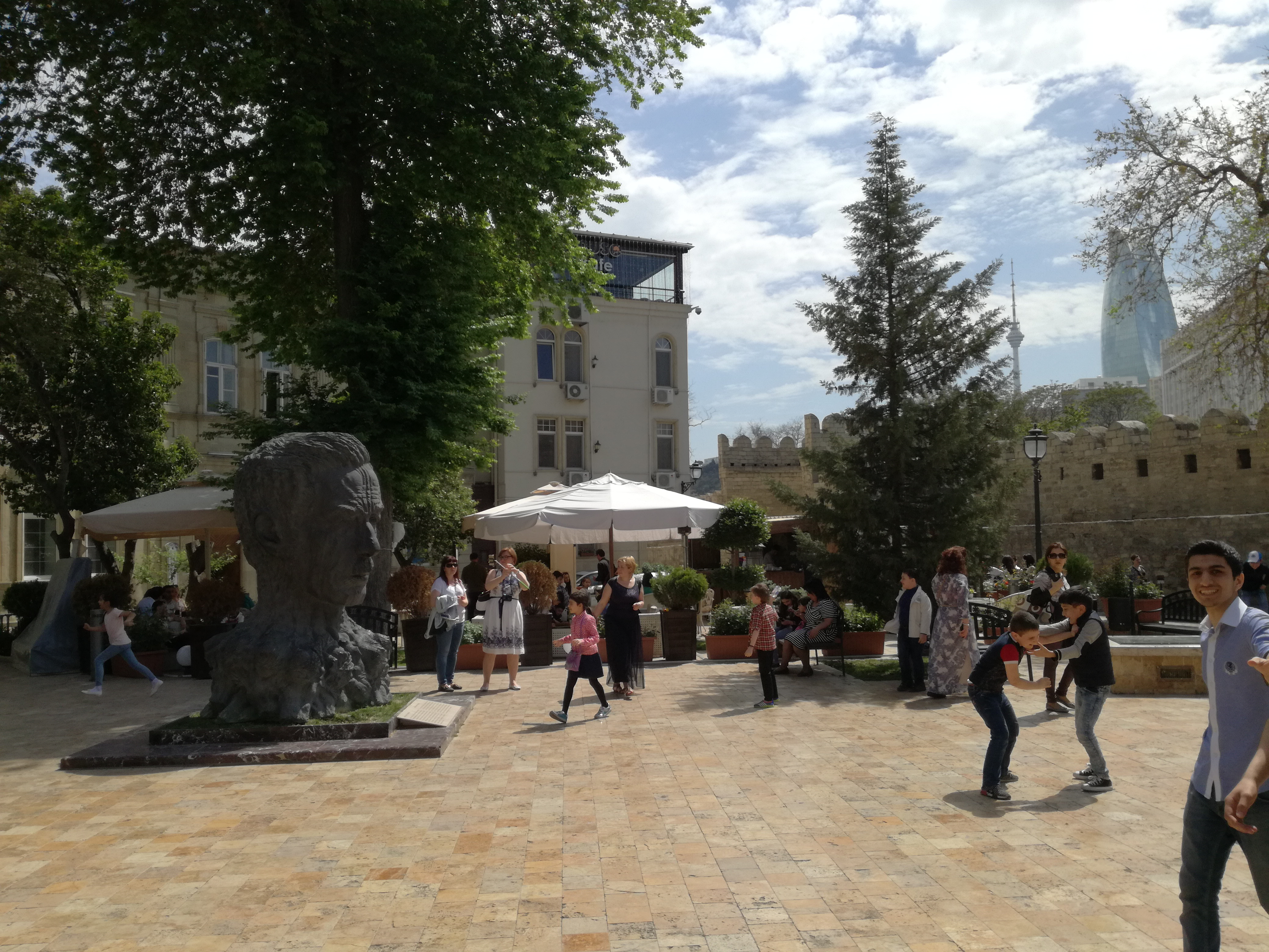 Улица Кичик Гала.